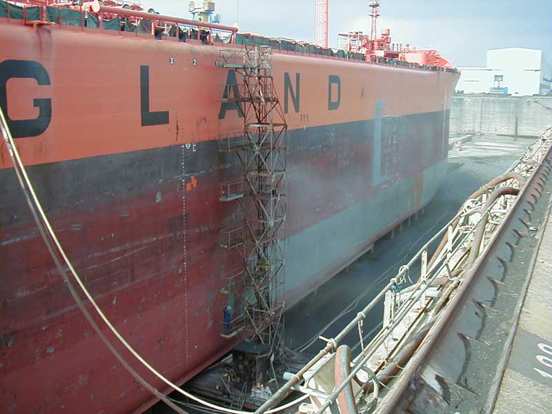 Sablage de la coque d'un pétrolier en cale sèche à Brest.